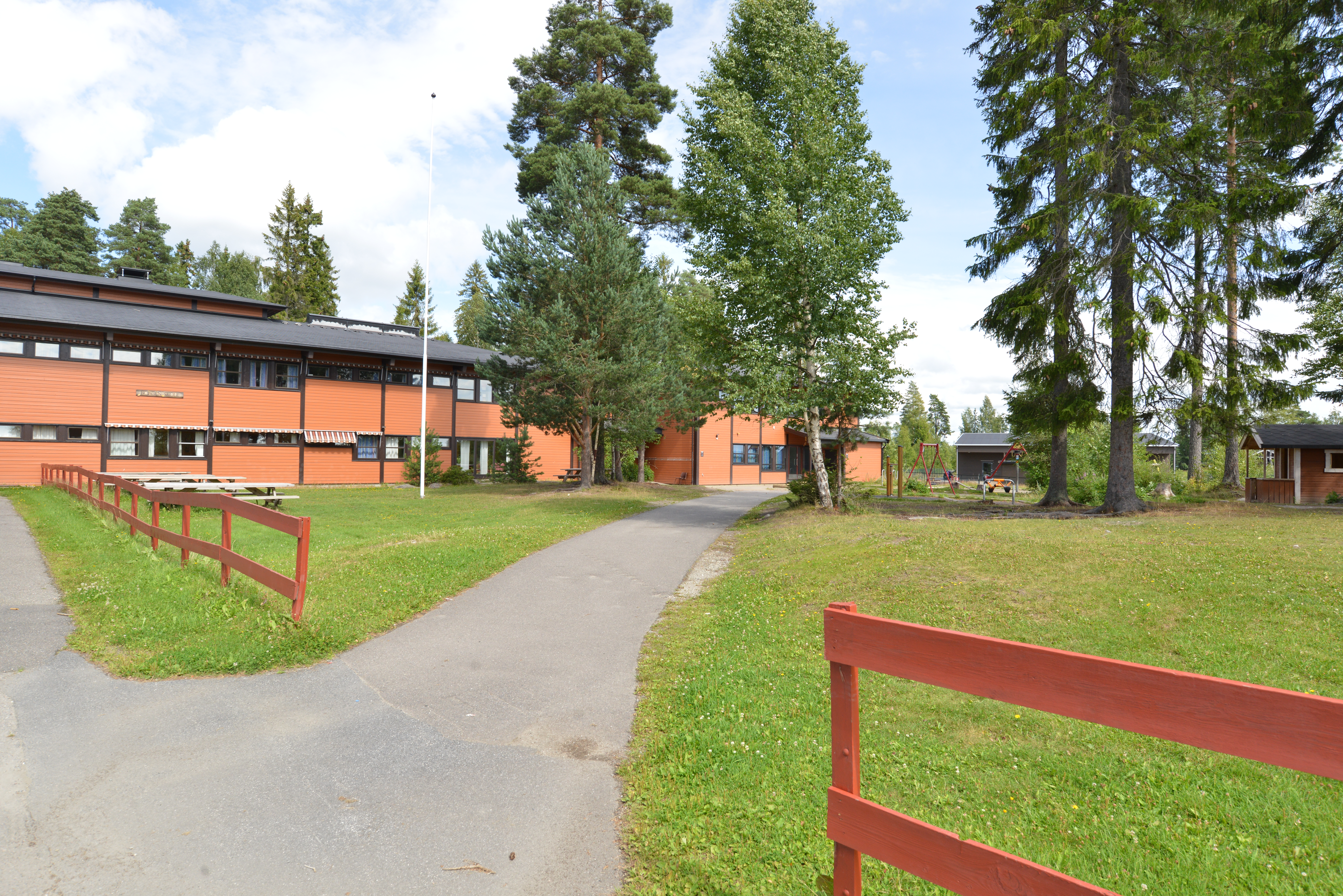 Borgen skole på Borgen i Ullensaker